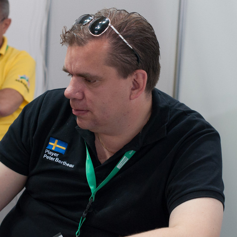 Swweden Bertheau Peter